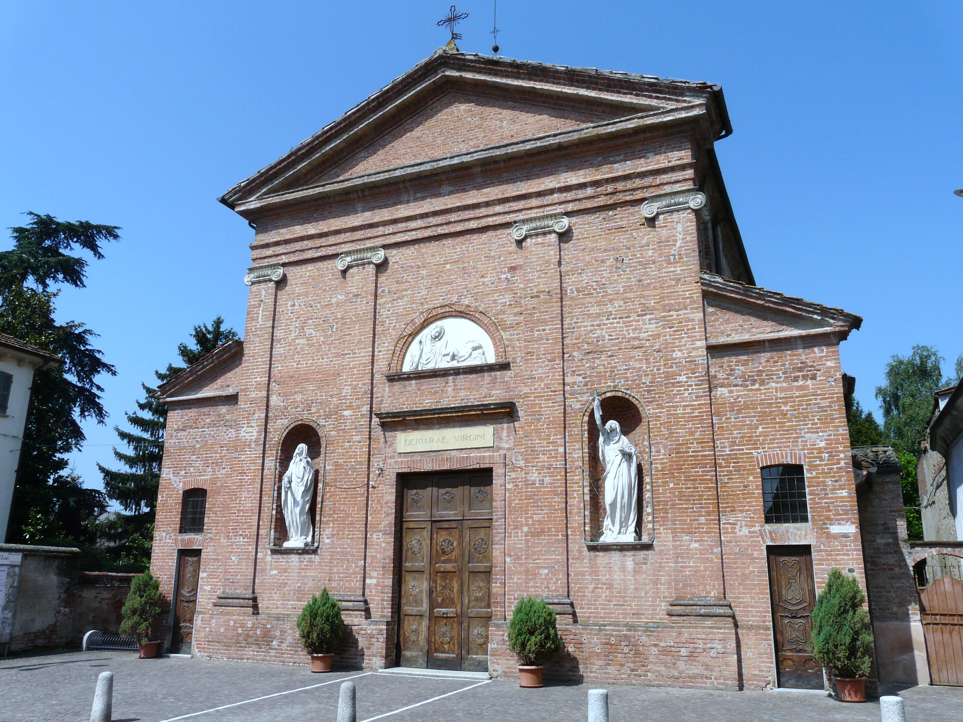 Chiesa della Visitazione di Maria Vergine, Bozzole, Piemonte, Italia